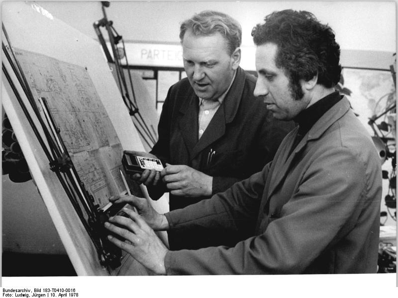 Ingenieure am Reissbrett ADN-ZB Ludwig-10.4.78 Bez. Erfurt: Wettbewerb-Sieben Monate früher als im Staatsplan vorgesehen haben die Werktätigen des VEB Getriebewerk Gotha die Serienproduktion eines neuen Spezialgetriebes für einen neuen U-Bahn-Wagentyp aufgenommen, der im VEB LEW Hennigsdorf für die U-Bahn der Hauptstadt gebaut wird. Hohen Anteil bei der Anerkennung mit dem Gütezeichen "Q" für das neue Getriebe haben der Konstrukteur des neuen Erzeugnisses Hans Knoll (r.) und Abteilungsleiter für Forschung und Entwicklung Horst Lätsch. Hans Knoll ist Vertrauensmann der Konstruktionsabteilung und spielt in seiner Freizeit im Stadtorchester Ohrdruf. Horst Lätsch, Mitglied der SED und APO-Sekretär, ist Hobbyfotograf, pflegt aktiv die russische Sprache und übersetzt in seiner Freizeit sowjetische Fachliteratur.